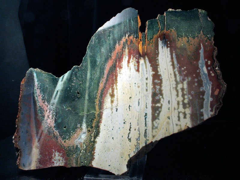 jaspis obikularny, pochodzenie Madagaskar, autor zdjęcia Stowarzyszenie Spirifer